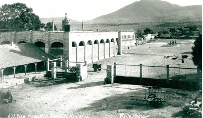 Hacienda de Atequiza, Mexico